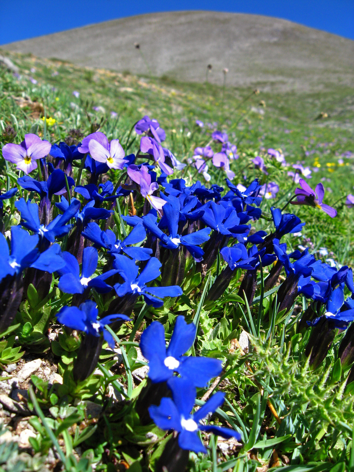 Gentiana Verna is a variform species that occurs in many places of C. & S. Europe and easterly till the Central Asia. On Olympus Mt., it is represented by ssp. Balcanica, a perennial plant, having a height of 3-7 cm with thin underground buds, ending in roses through oval and sharp leaves. Those roses form thicket or pillow. The flowers are solitary and marginal. The calyx has 5 wings and lance-shaped teeth. The corolla has a length of 15-25 mm and is deep blue shining. Lies on snow-covered meadows, onto the alpine zone (2000-2800m. approximately). Η Gentiana Verna είναι είδος ποικιλόμορφο που απαντάται σε πολλά μέρη της Κ. & Ν. Ευρώπης και ανατολικά μέχρι την Κ. Ασία. Στον Όλυμπο αντιπροσωπεύεται με το ssp. Balcanica, φυτό πολυετές, ύψους 3-7 εκ. με λεπτούς, υπόγειους βλαστούς που καταλήγουν σε ρόδακες από ωοειδή, λίγο αιχμηρά φύλλα. Οι ρόδακες αυτοί σχηματίζουν λόχμη ή προσκεφάλιο. Τα άνθη είναι μονήρη και ακραία. Ο κάλυκας έχει 5 πτέρυγες και λογχοειδείς οδόντες. Η στεφάνη έχει μήκος 15-25μμ. Και είναι στίλβουσα βαθιά κυανή.Βρίσκεται σε λιβάδια με χιονοστρώσεις στην αλπική ζώνη (2000-2800μ. περίπου). This is a photography of Natura 2000 protected area with ID GR1250001